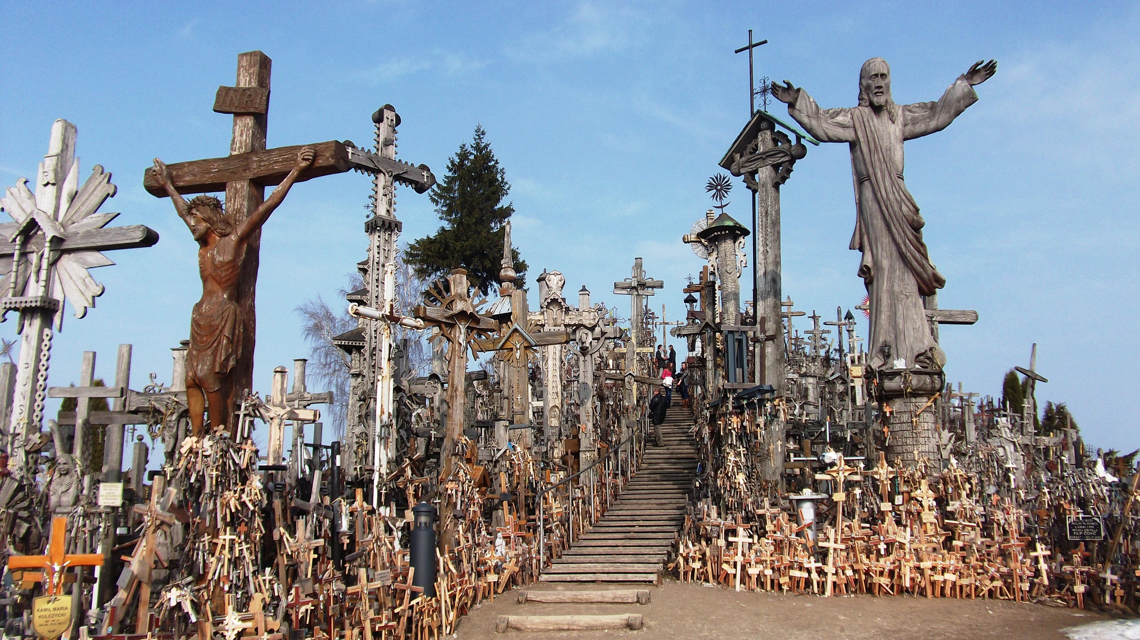 Kryžių kalnas. Šiaulių raj.